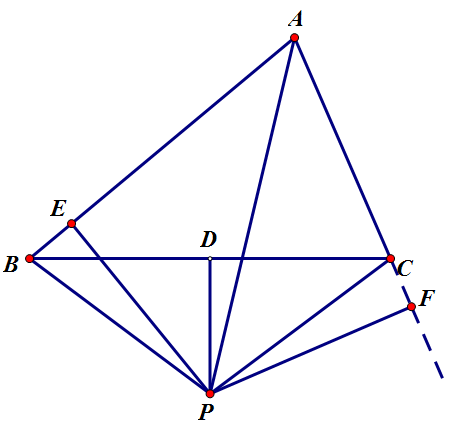 使用几何画板绘制